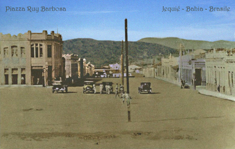 Vista da Praça Ruy Barbosa com a atual Avenida Alves Pereira ao fundo. Início dos anos 1930.